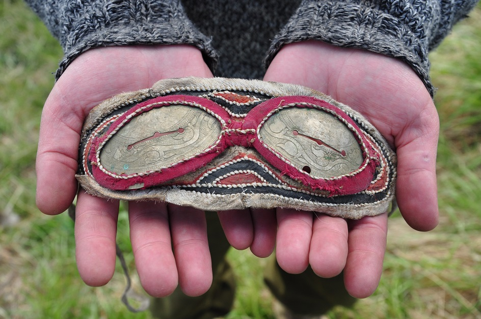 Нганасанские очки. Посёлок Волочанка.